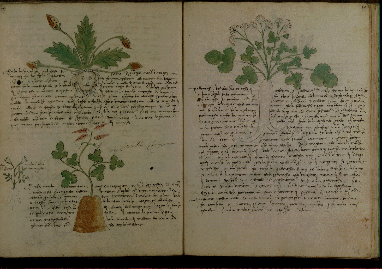 Erbario manoscritto del XVI secolo